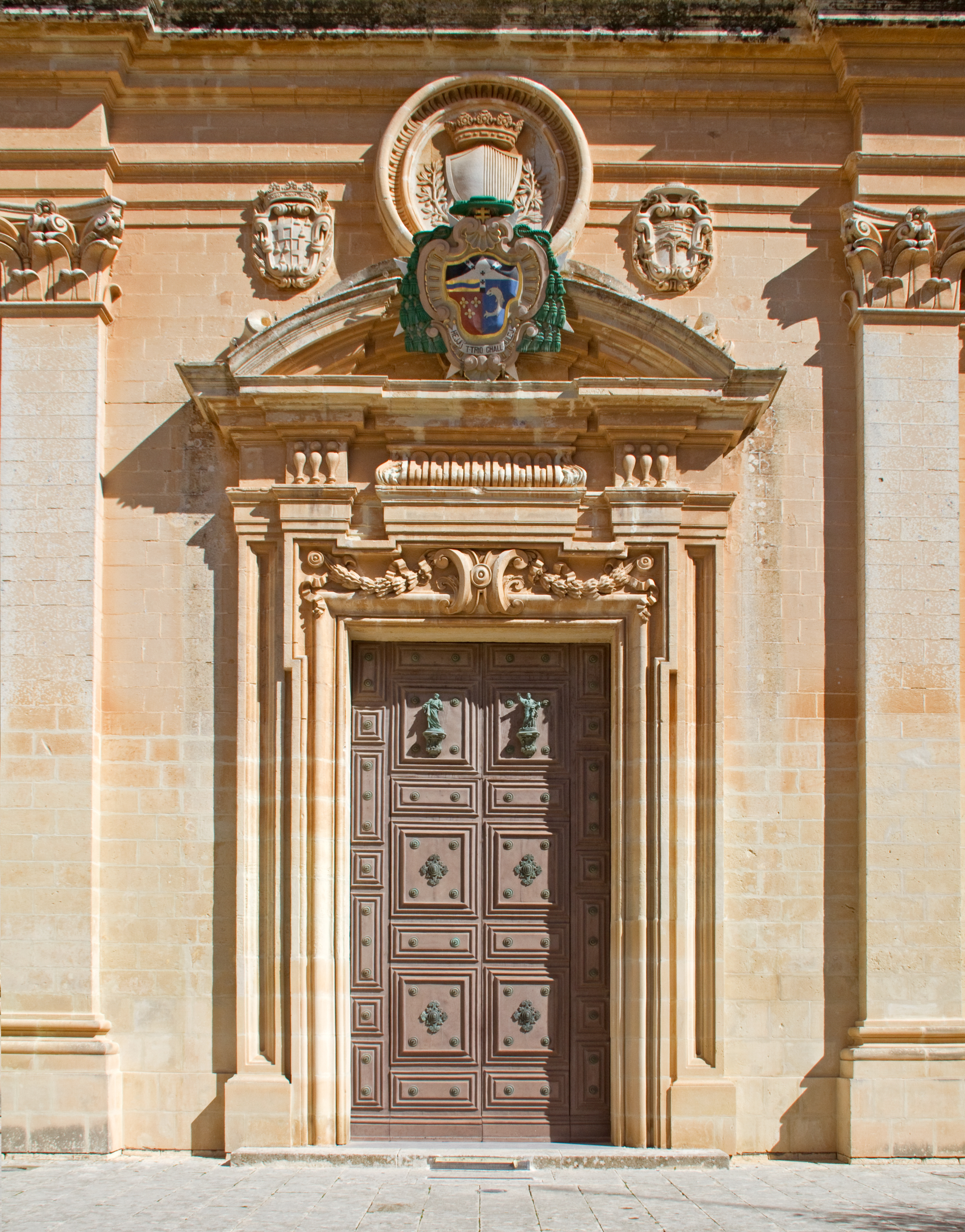 Door